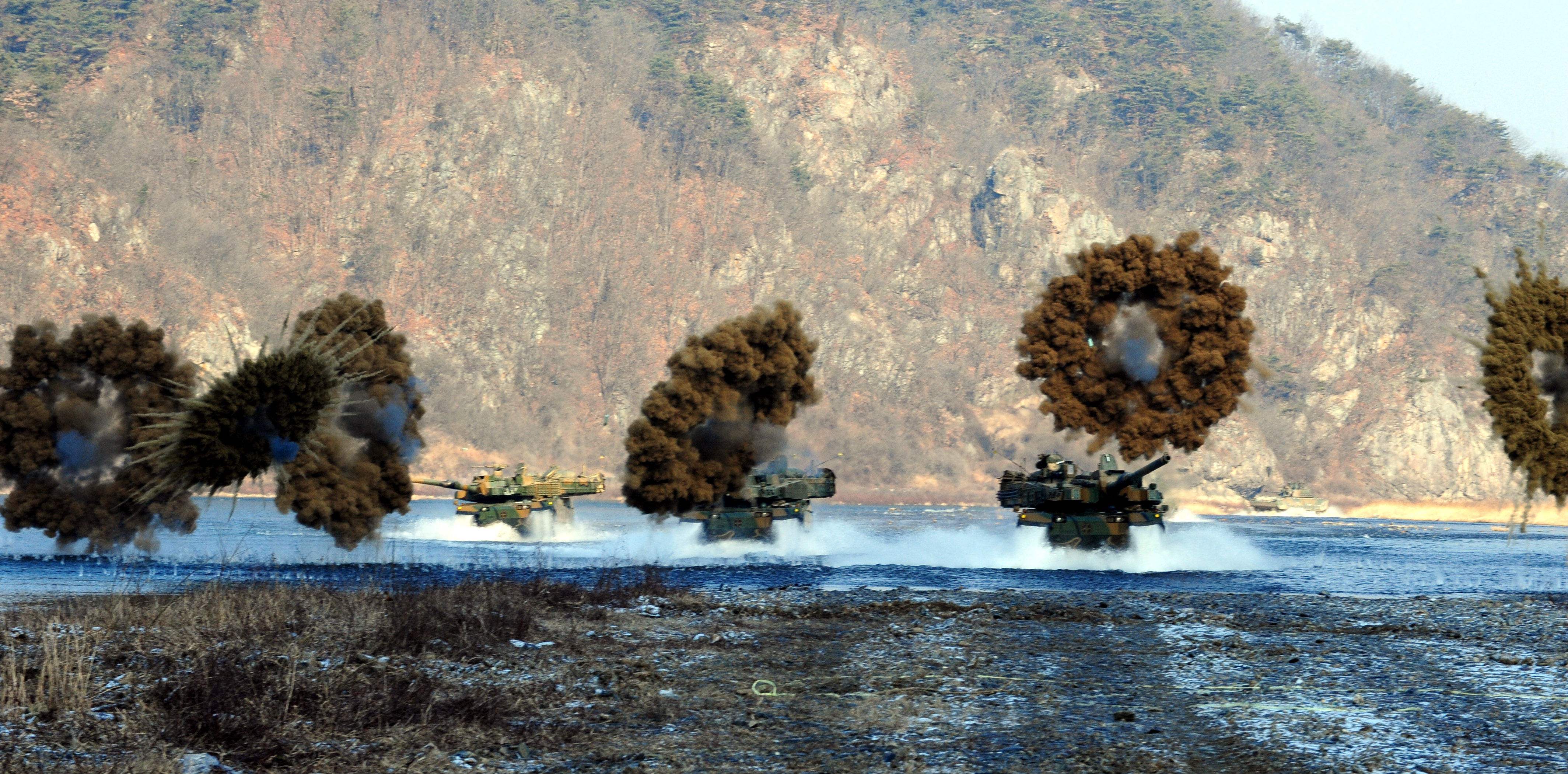 20사단 남한강 혹한기 훈련- (1)